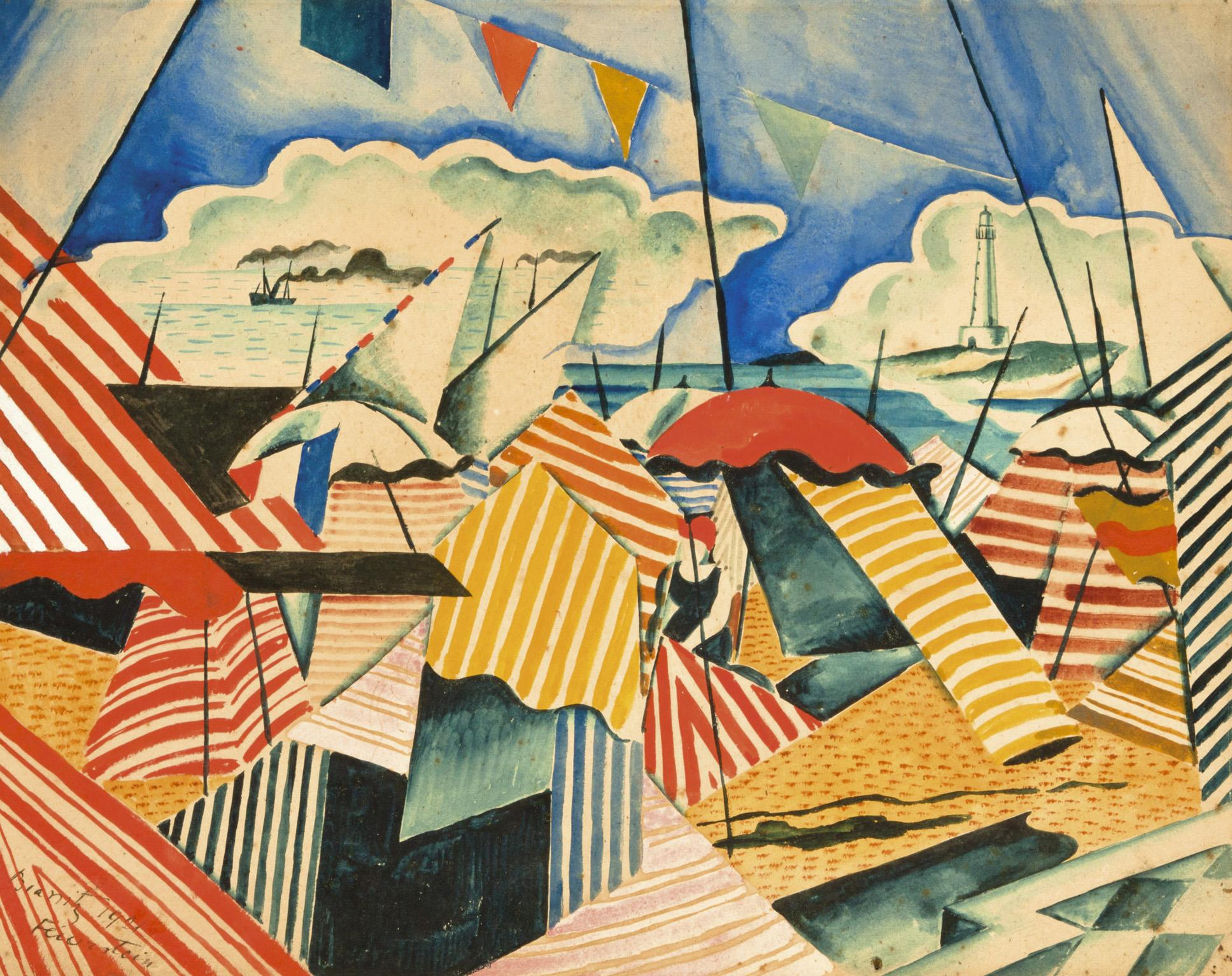 Biarritz, links unten signiert, datiert und gekennzeichnet: Feuerstein 1921 Biarritz, kombinierte Technik/Papier, 39 x 49 cm